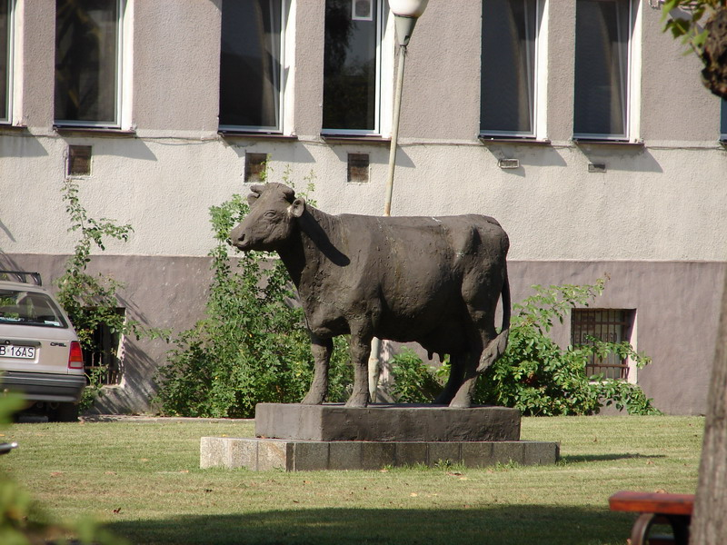 Pomnik krowy w Starym Polu